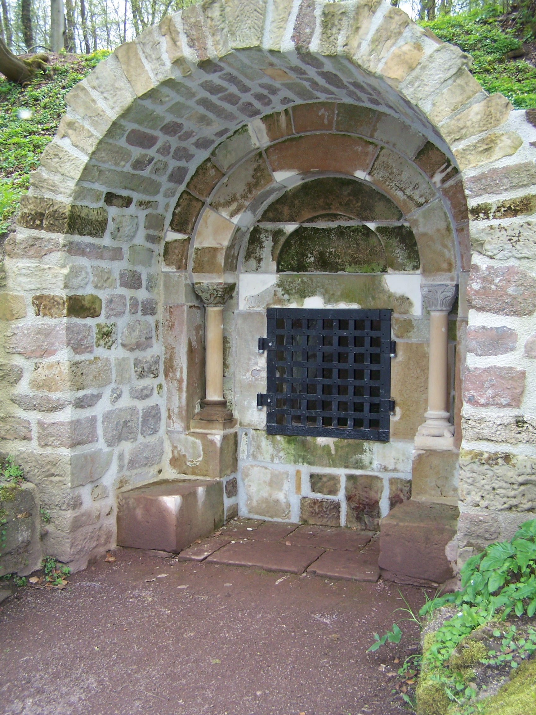 Elisabethbrunnen